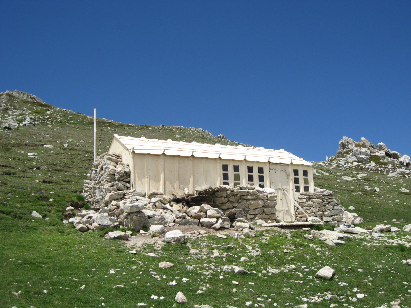 Refugi de la Portella de Rojà